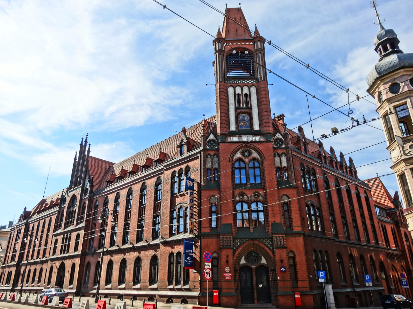 Budynek Poczty Głównej w Bydgoszczy przy ul. Jagiellońskiej (zbud. 1883 skrzydło płd, 1899 skrzydło płn)